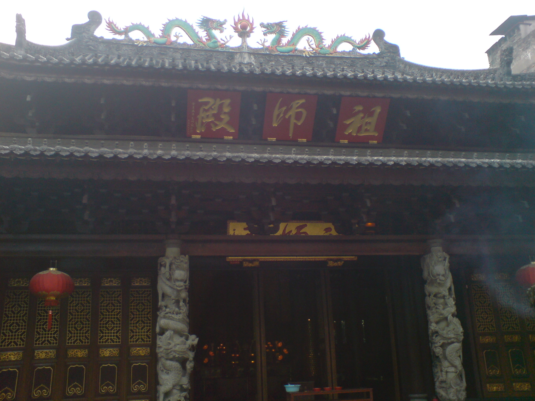 广州华林寺祖师殿